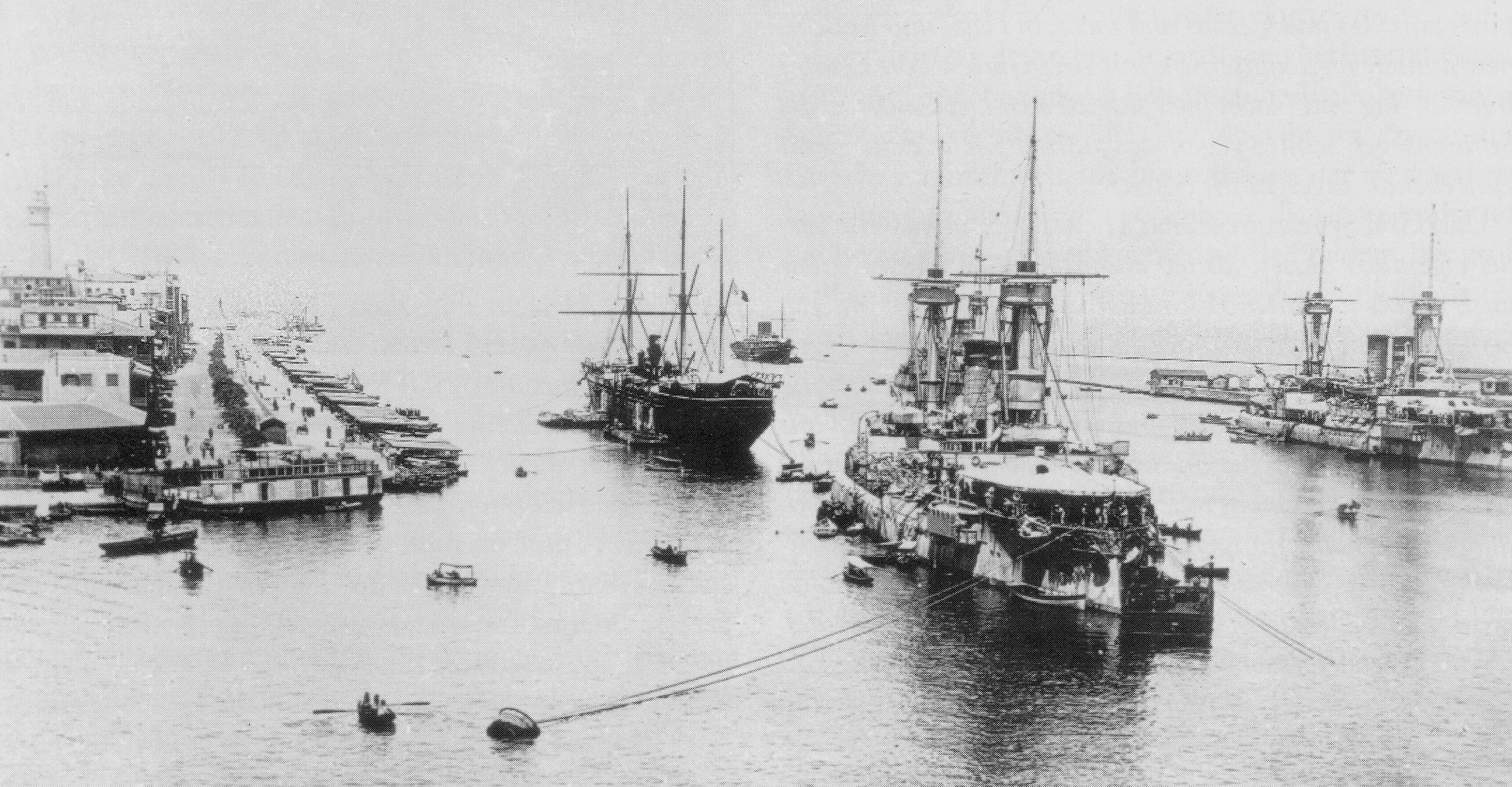 Die deutschen Panzerschiffe SMS Brandenburg (Vordergrund) und SMS Weißenburg (rechts im Bild) im Hafen von Port Said.